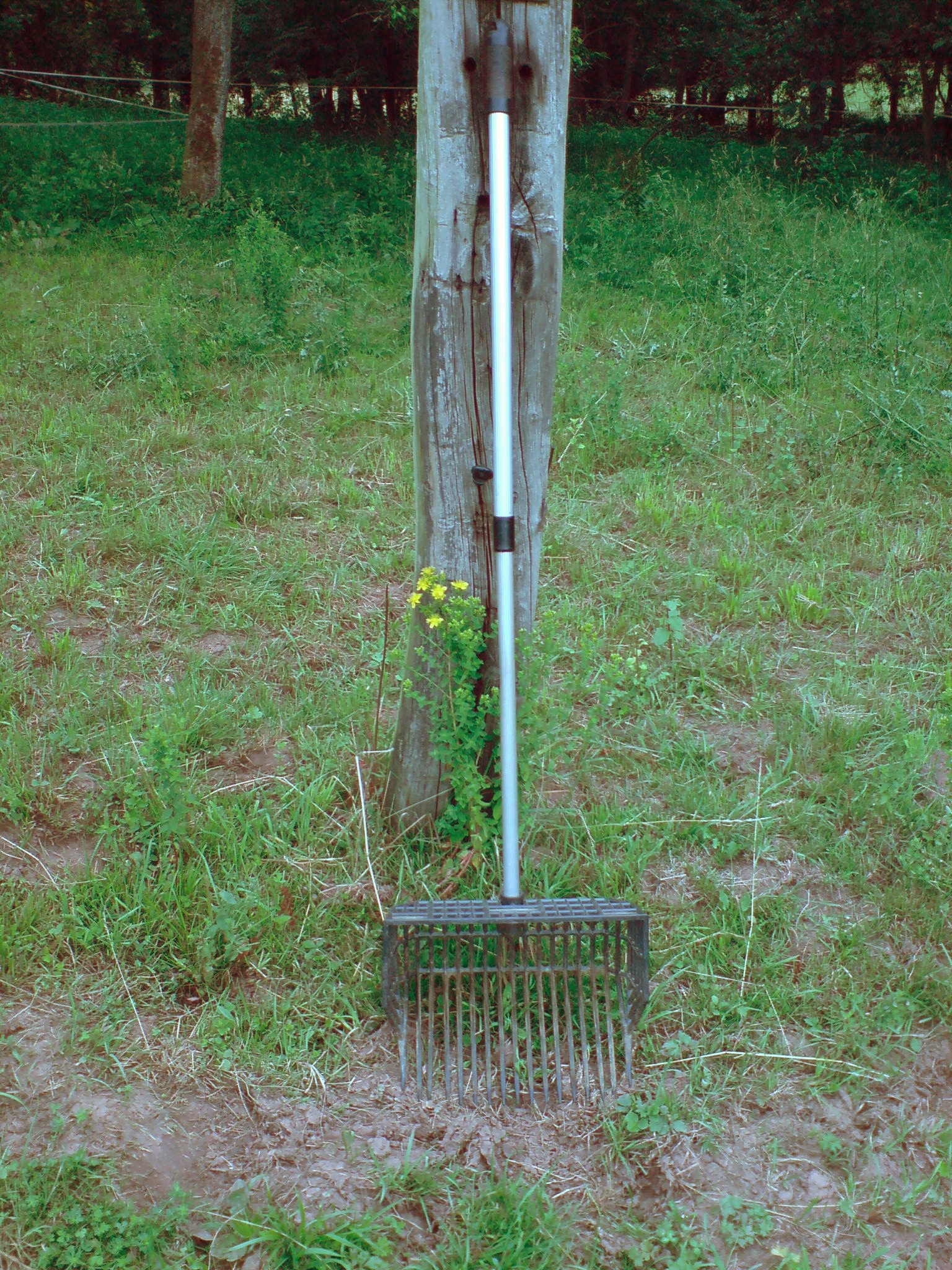 Bollengabel zum Auflesen von Pferdeäpfeln. 17 Zinken und Korb, Spritzguss aus faserverstärktem Kunststoff, Stiel zweiteilig längenverstellbar aus gerieftem Alurohr, klemmt durch Verdrehen, Griffende aus Kunststoff.